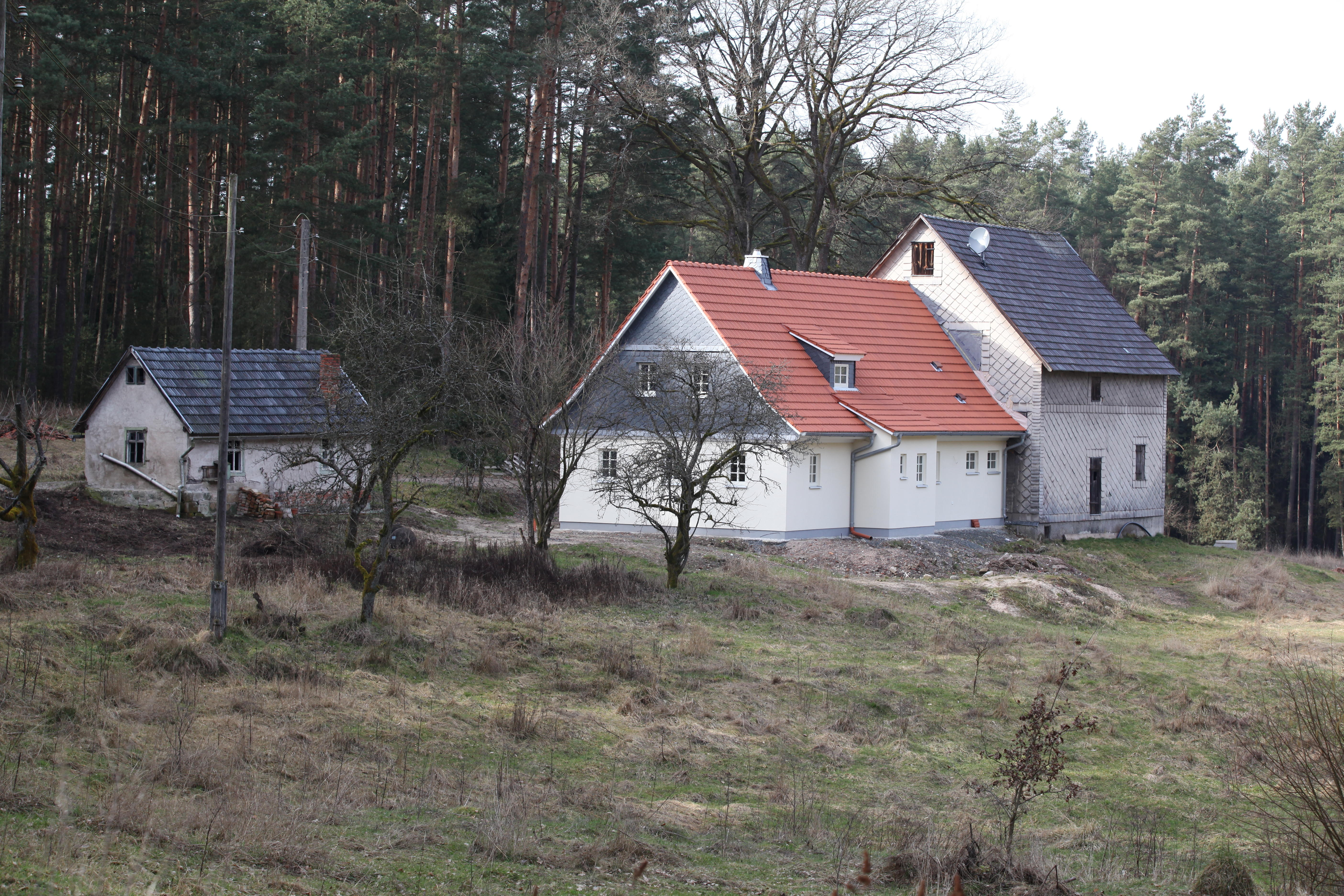 Rotheul Siebenbirkenwustung